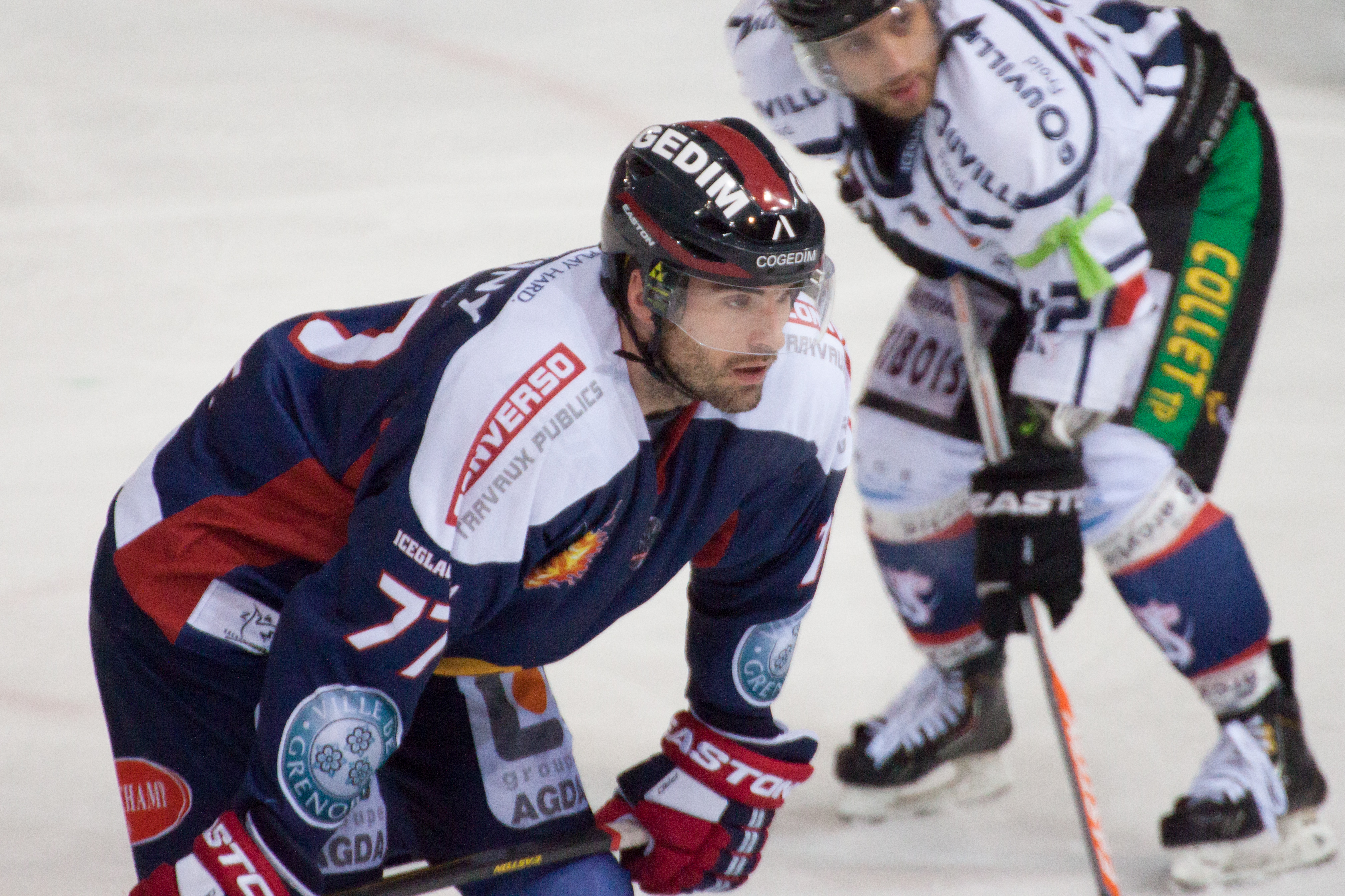 Yorick Treille sous le maillot des Bruleurs de Loups le 4 octobre 2013 contre Drakkar de Caen à la Patinoire Pôle Sud.